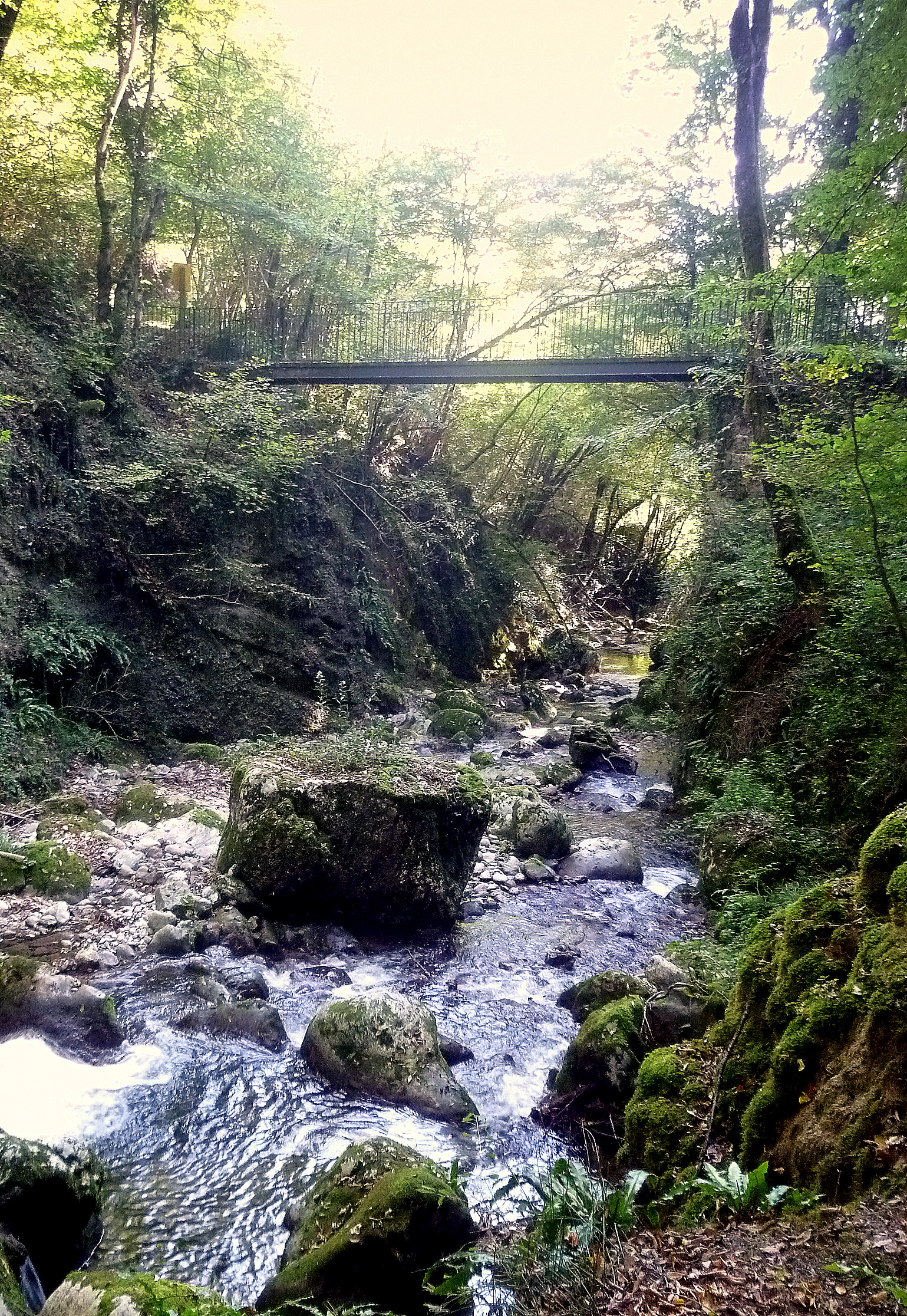 passerelle sur le ruisseau le Tenaison, à Proveysieux, Isère